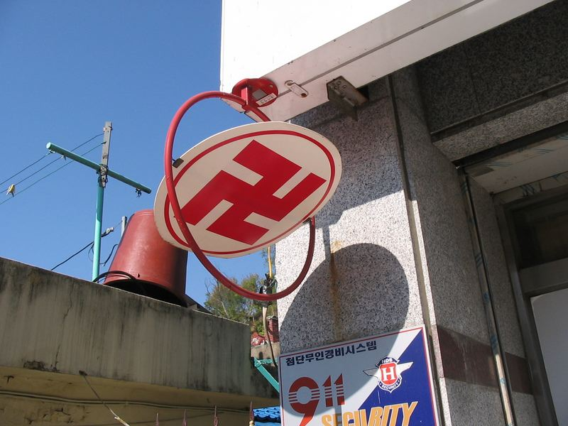 Date : février 2005 Source : photo personnelle du contributeur Mammique Description : enseigne dotée d'une svastika en Corée. Ce symbole y est très courant, et sert à indiquer les lieux religieux. Licence